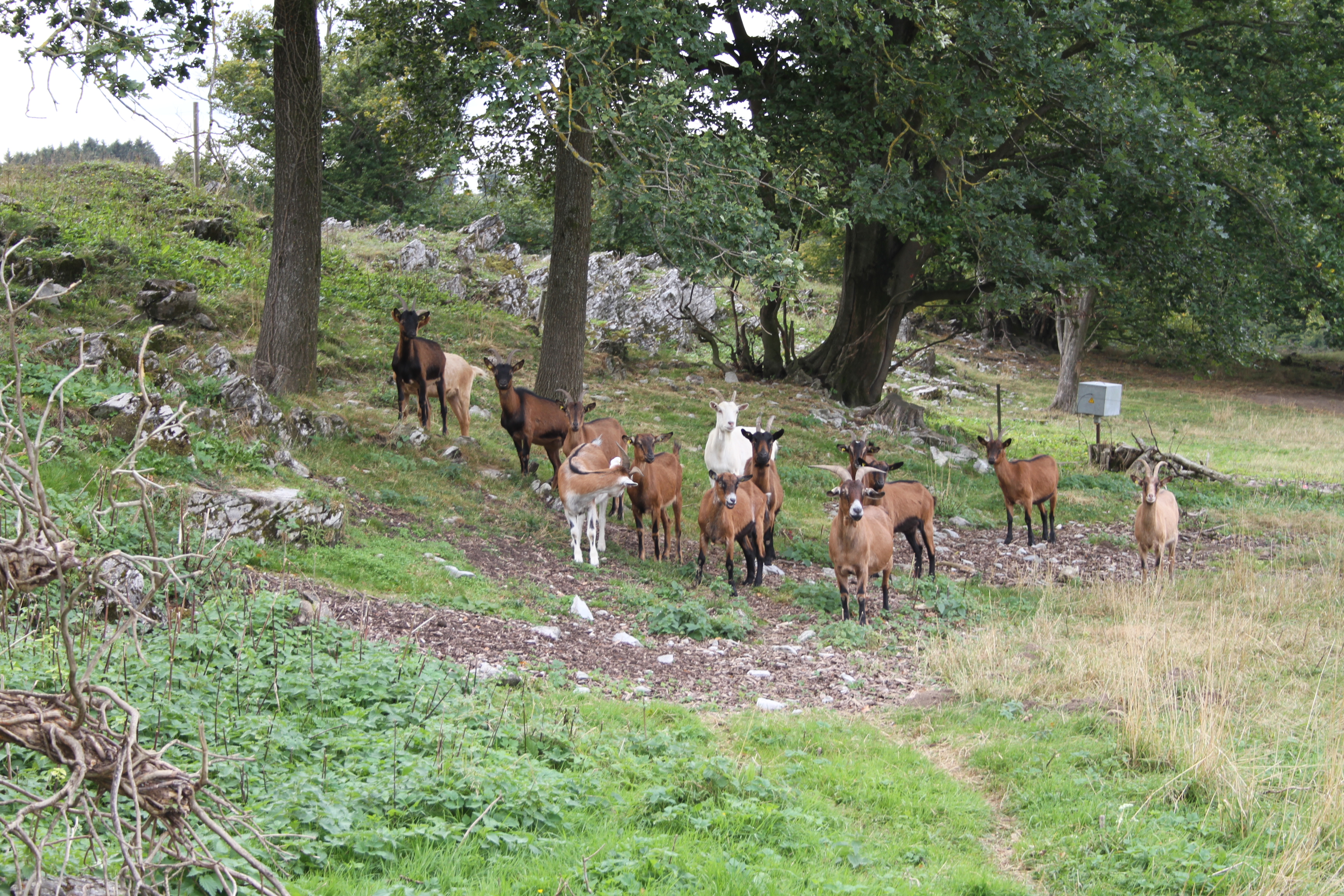 Magerrasen mit Ziegenbeweidung am Hoher Stein im Naturschutzgebiet Lörmecketal (Kreis Soest).